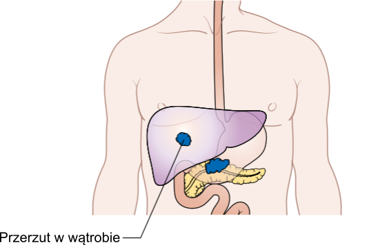 Cecha M w TNM raka trzustki